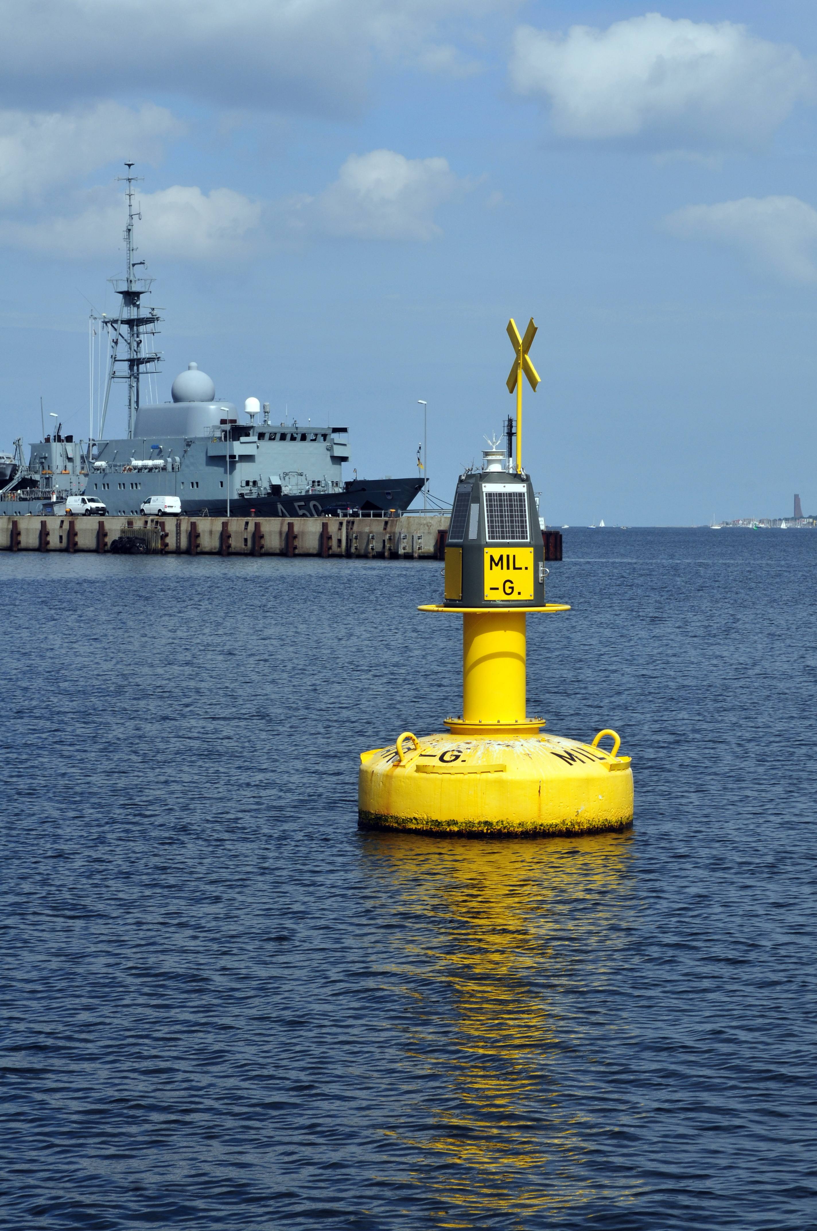 Landtagsprojekt Schleswig-Holstein; Marinestützpunktkommando Kiel